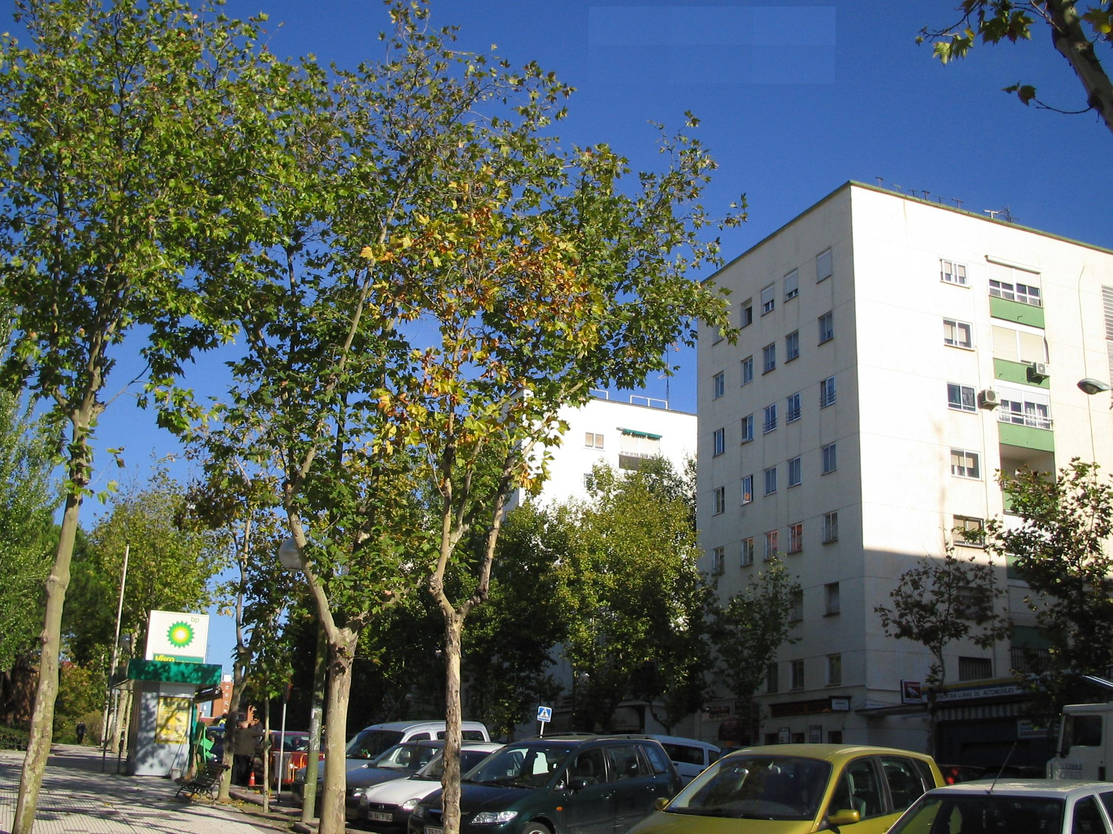 Ciudad de los Ángeles (Madrid)